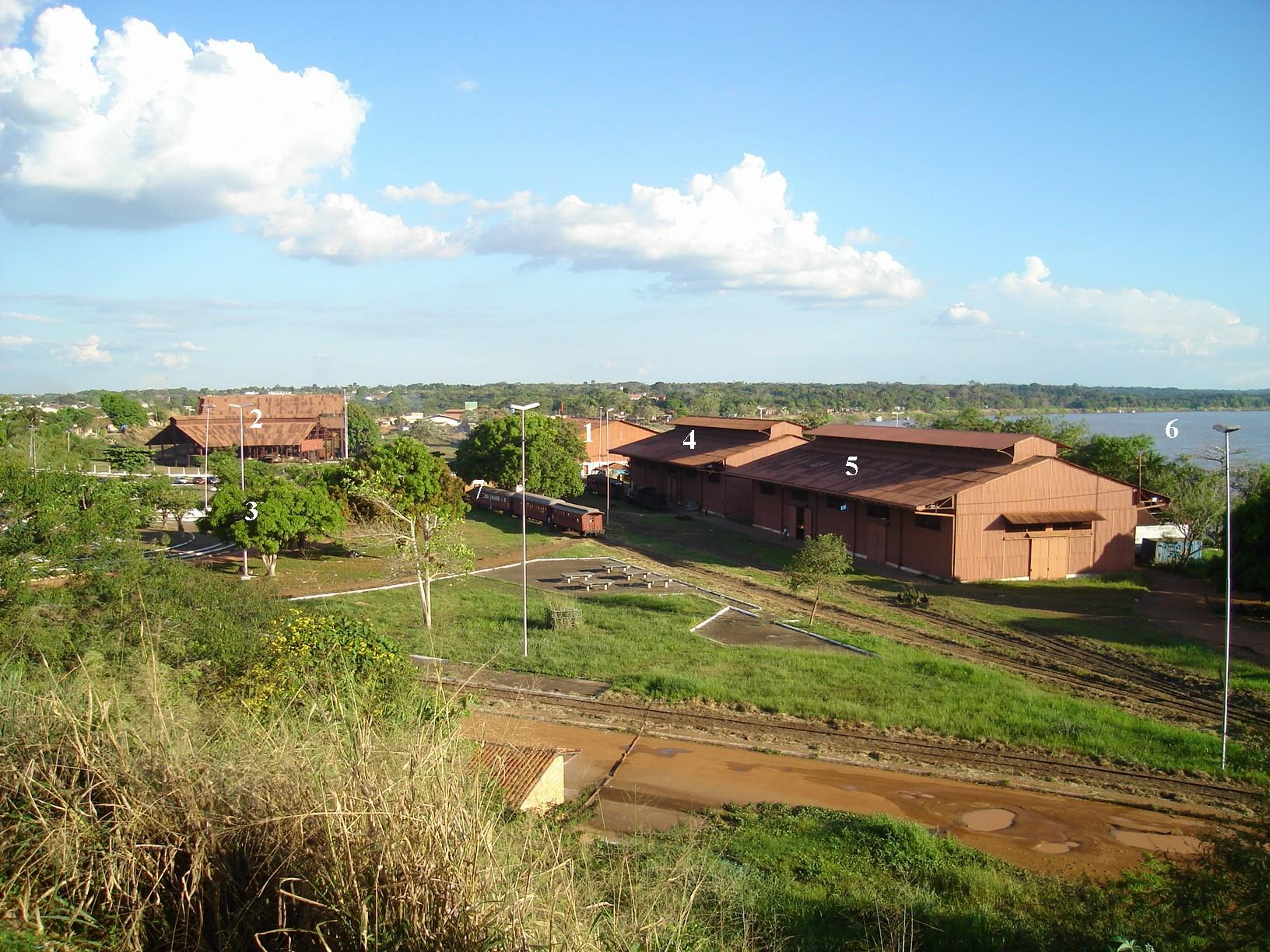 Estrada de Ferro Madeira-Mamoré em Porto Velho, Rondônia, Brasil, com legenda